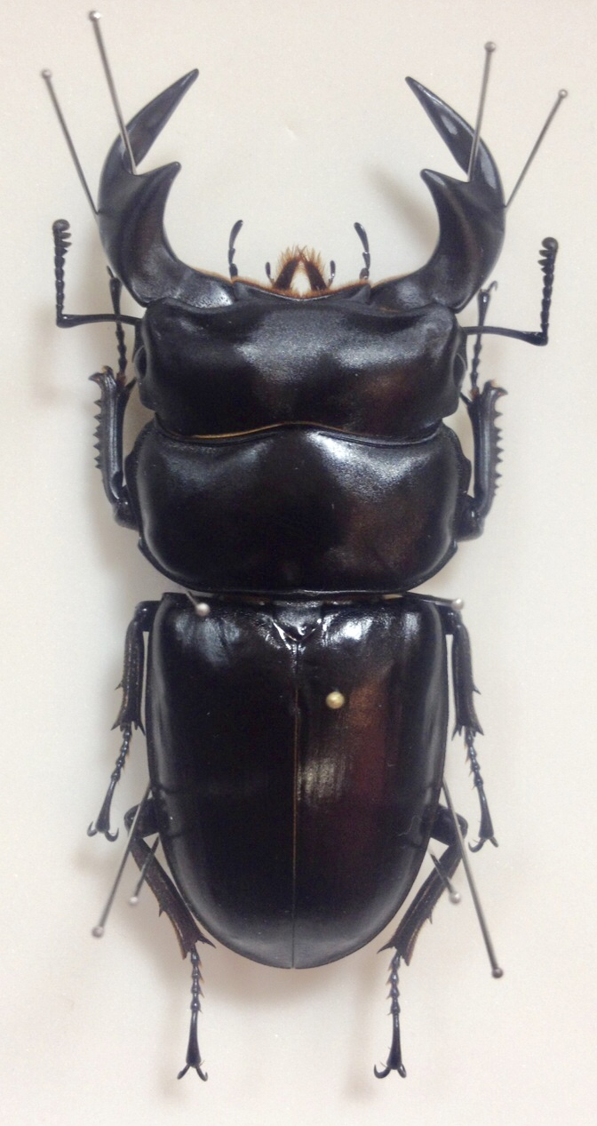 アンタエウス マレー産 78.5㎜